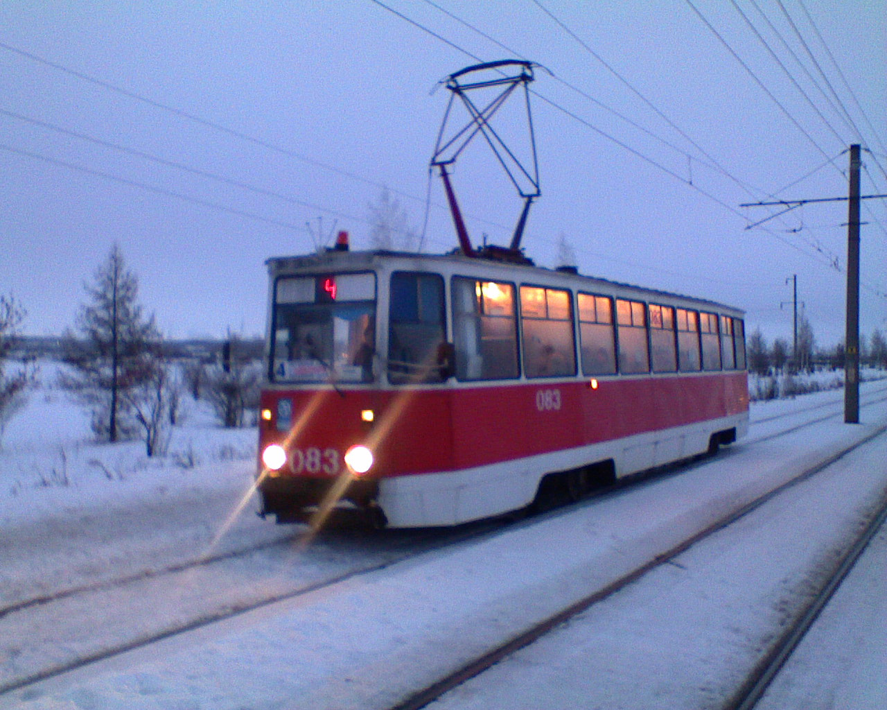 Трамвай 71-605 №083 в Набережных Челнах